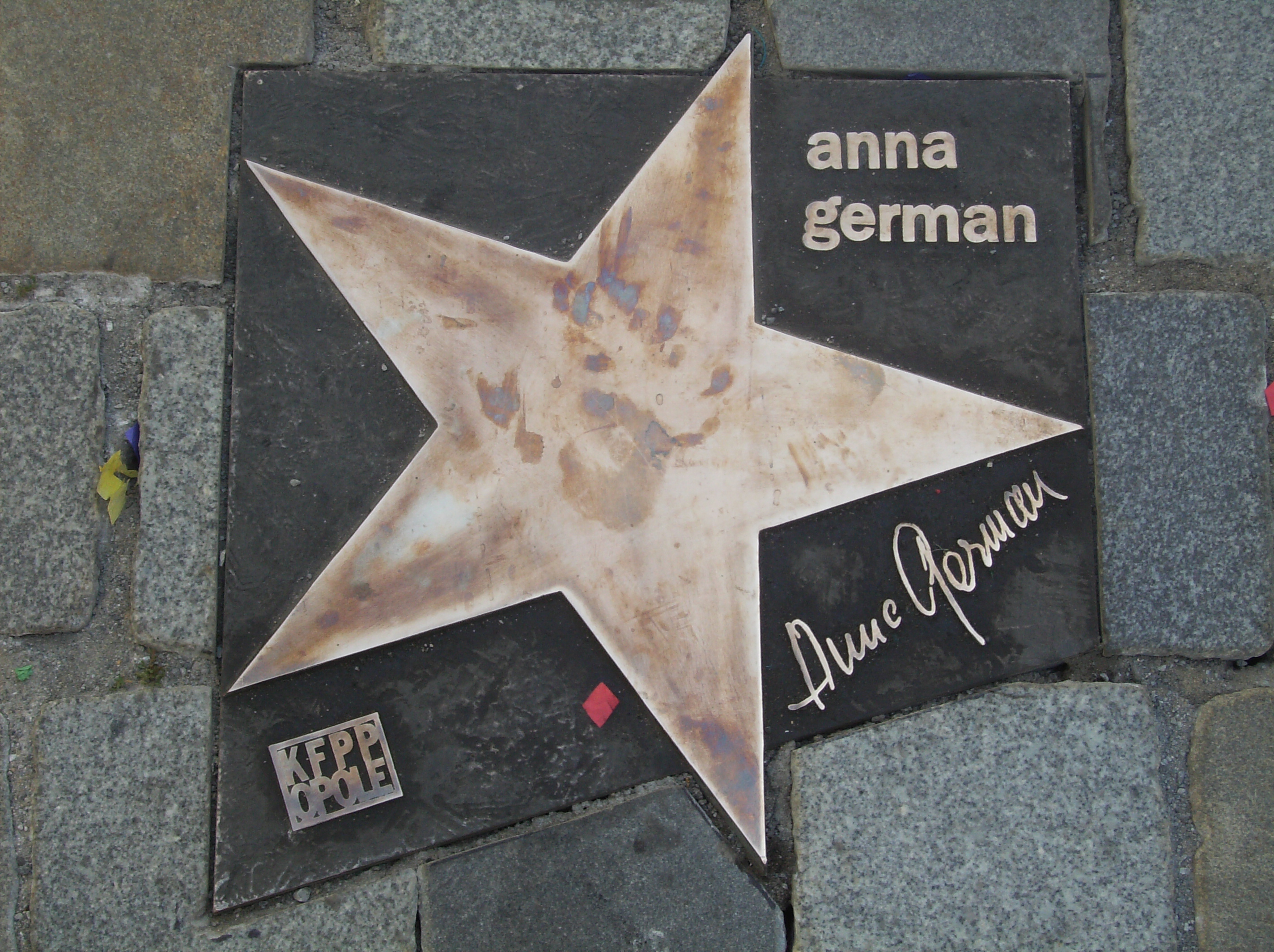 Gwiazda German w Alei Gwiazd Polskiej Piosenki w Opolu.